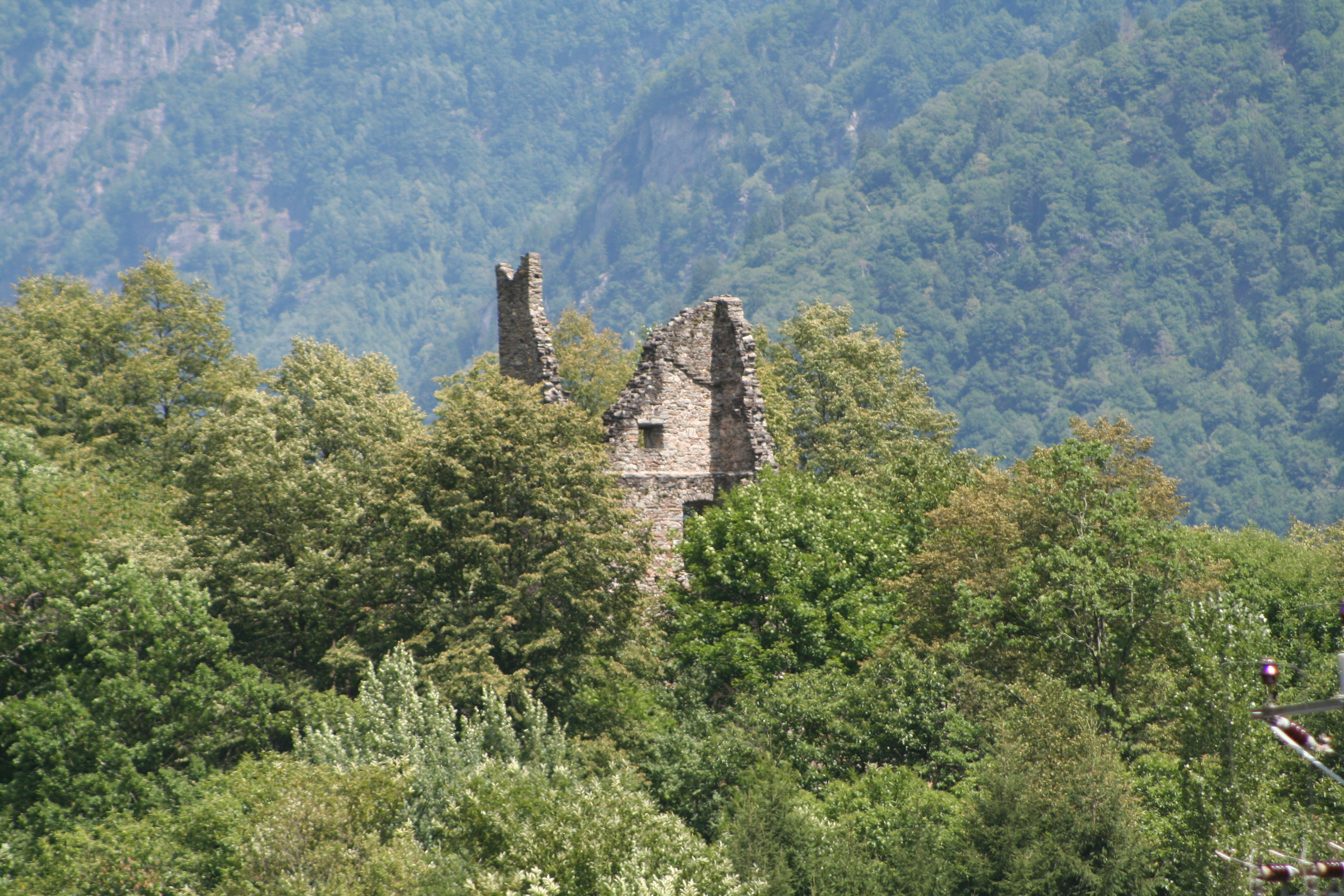 Ruine Norantola: Westmauer aussen